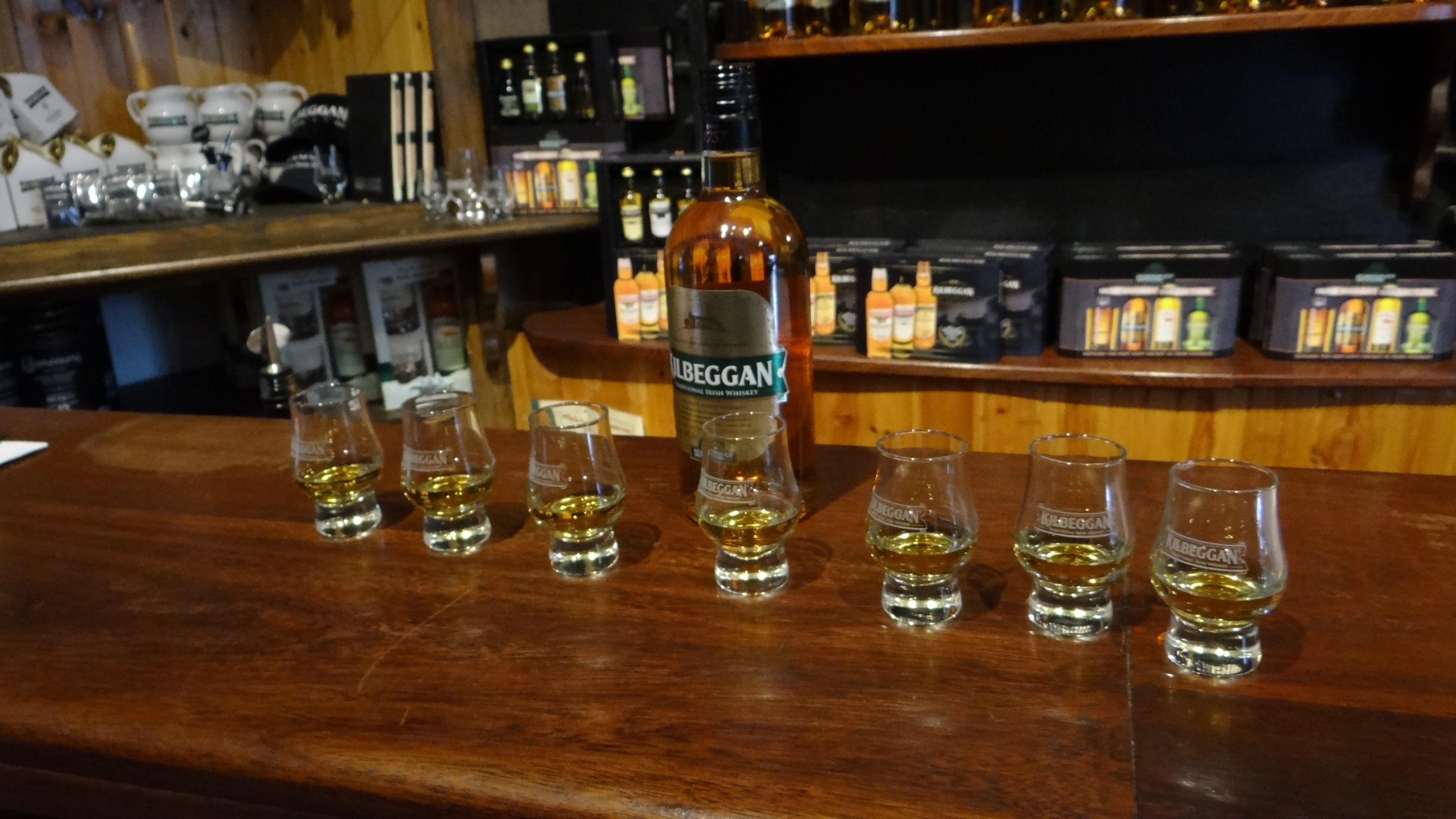 Distillerie de Kilebeggan